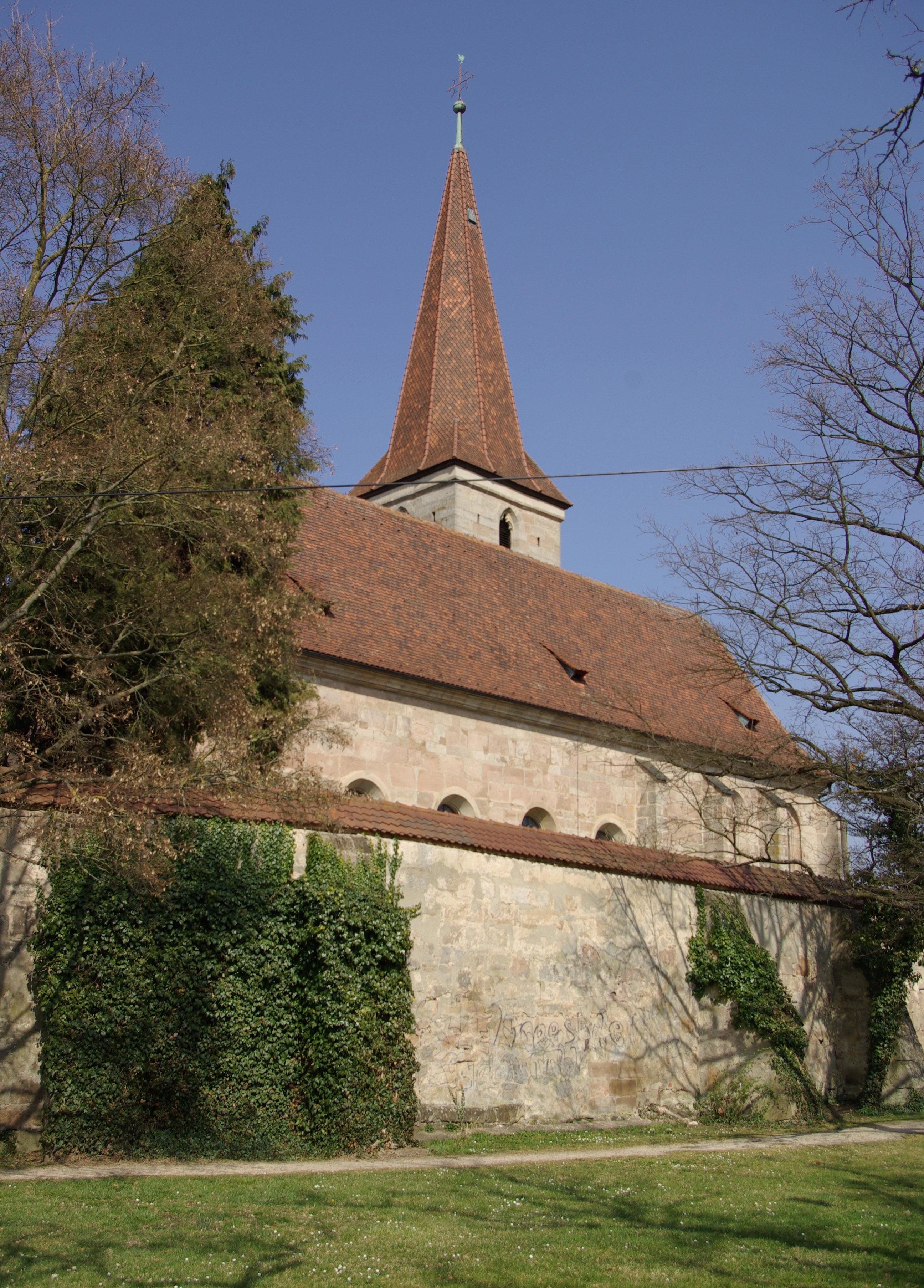 Kirche St. Xystus im Erlanger Stadtteil Büchenbach